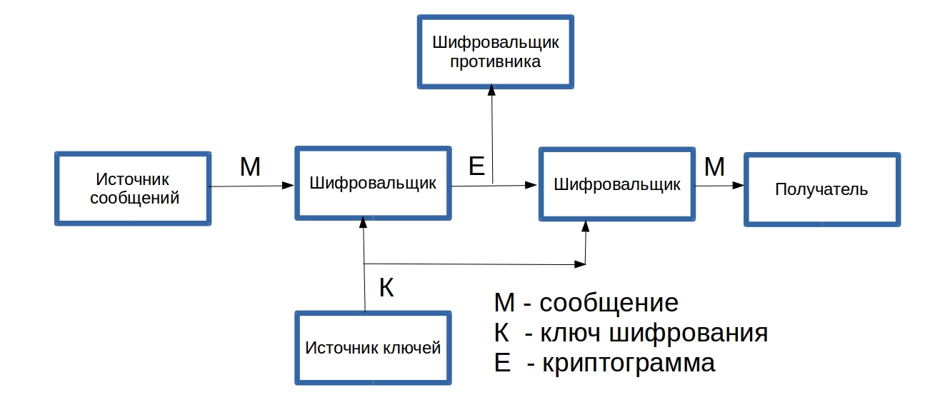 Модель Шеннона криптосистемы